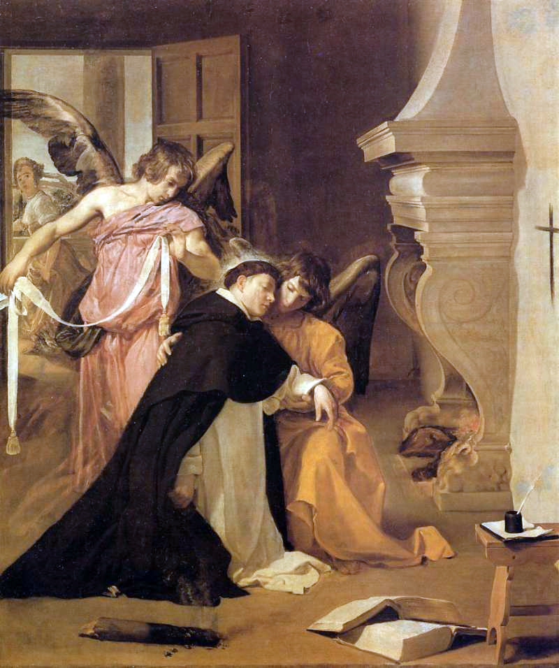 La obra representa al religioso y teólogo dominico Santo Tomás de Aquino siendo confortado por los ángeles tras haber rechazado los favores de una prostituta que aparece en la puerta y al fondo del cuadro.